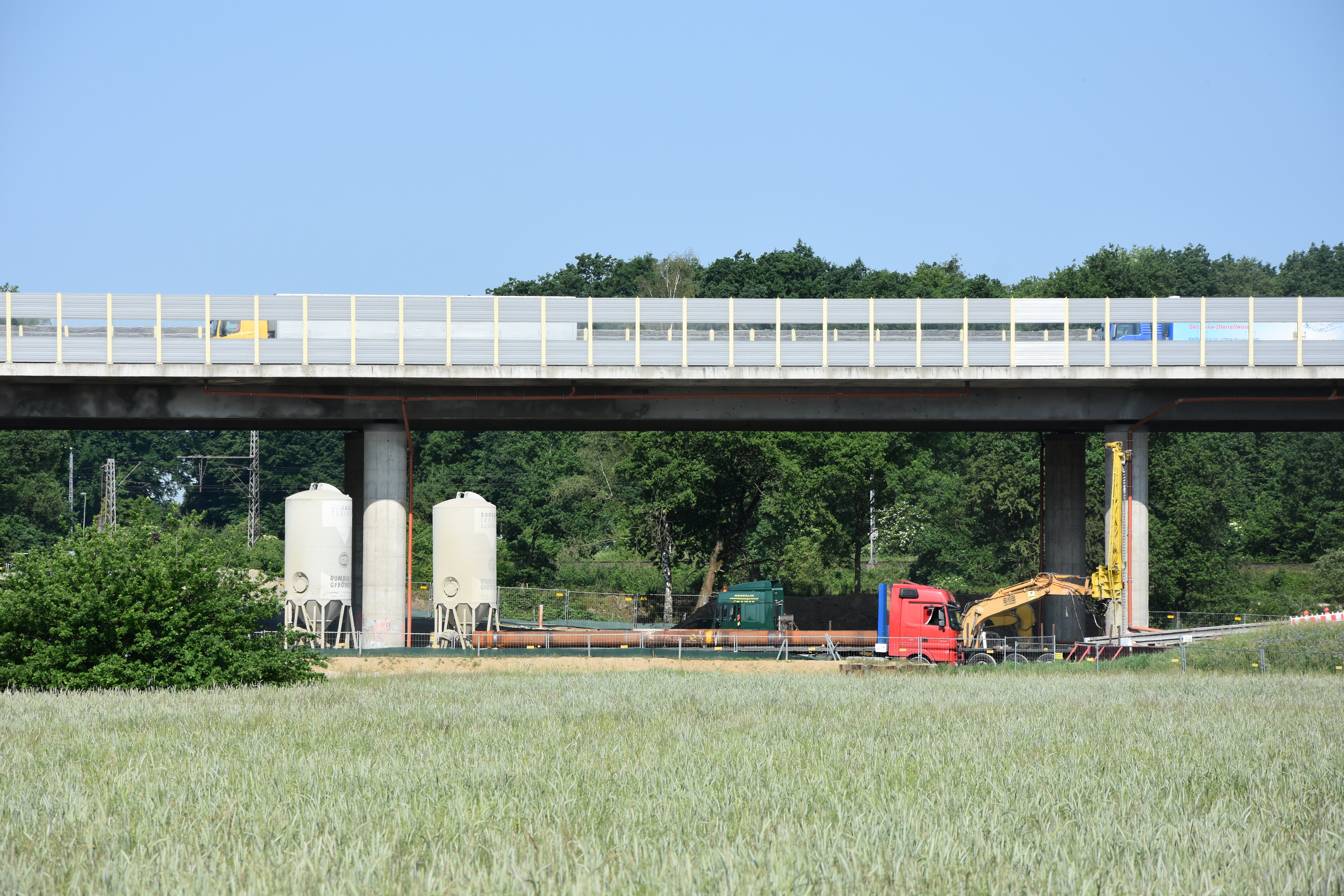 Dütebrücke bei Osnabrück